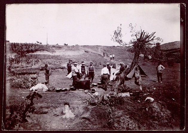 Български войници край Долни Порой по време на Балканската война, 1913 година